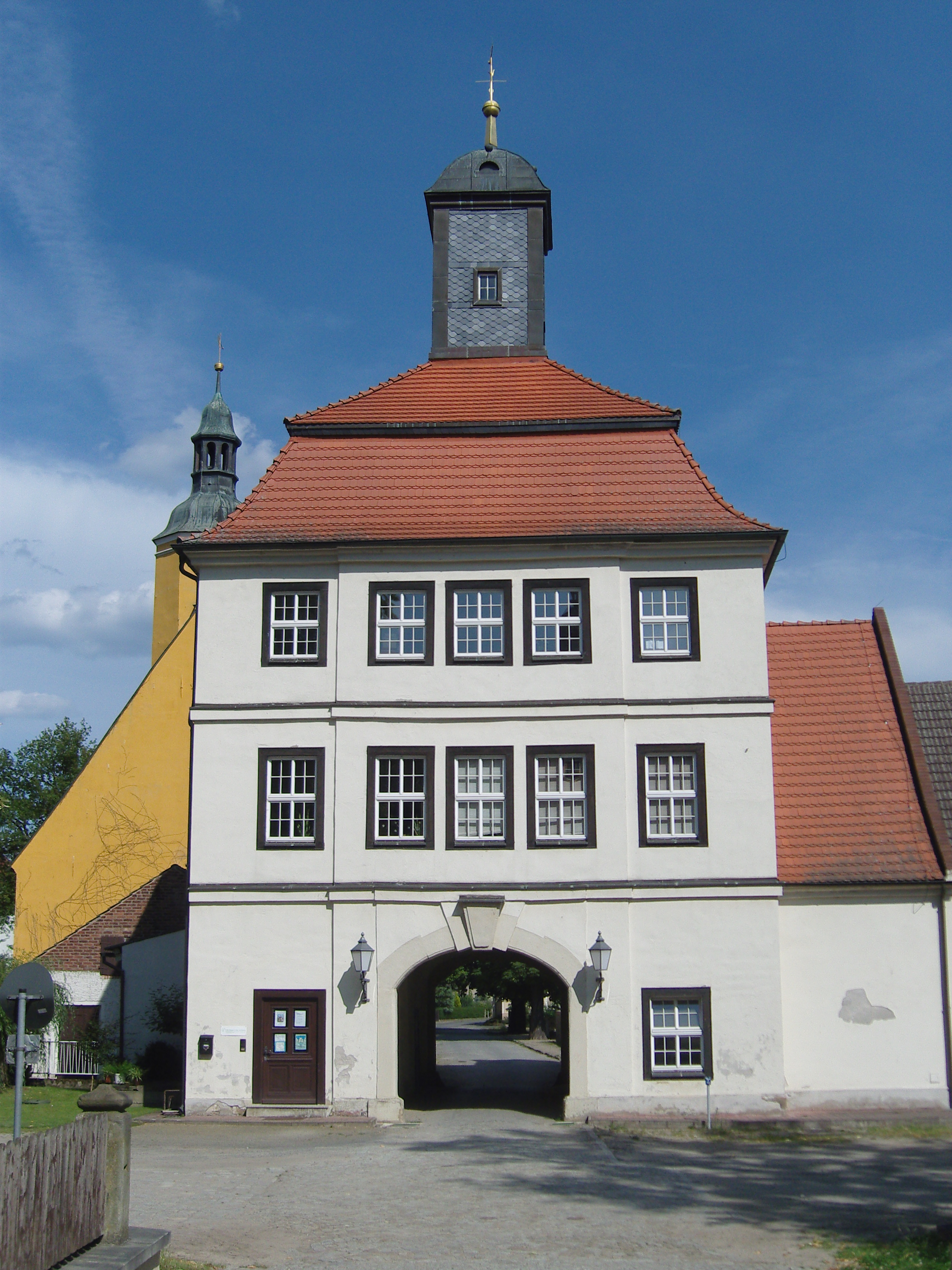 Torhaus Schloss Lindenau vom Schloss aus gesehen, Baudenkmal